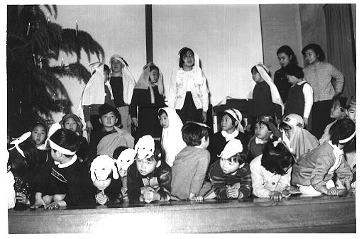 Priskribo Tio ĉi estas fotita de mia (forpasinta) patro advente de 1967 ĉe la preĝejo "Tomizaka" en Tokio. Mi estas la antaŭen-rigardanta pasxtisto proksime de la arbo. La foto estas mia propraĵo, kaj mi libere donacas al la mondo la rajton ĝin kopii kaj redakti laŭvole.